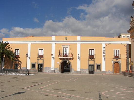 Autore e Fonte: Riccardo Spoto; Descrizione: Palazzo di Città di Santa Maria di Licodia (CT); Licenza d'uso